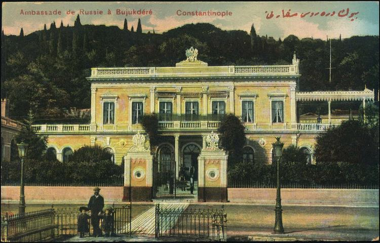 Руското посолство в Цариград